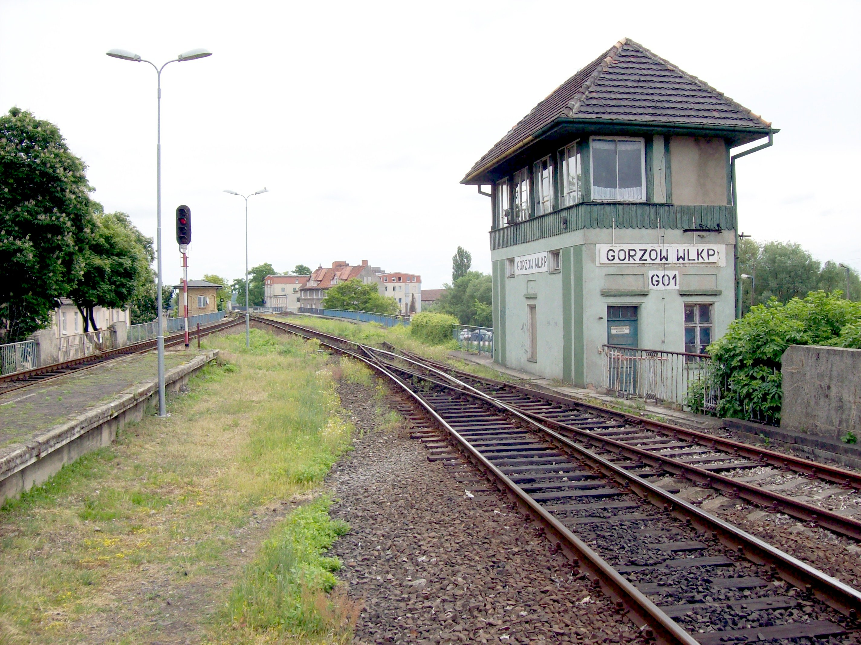 Linia kolejowa nr 203 - widok z peronów stacji Gorzów Wlkp.